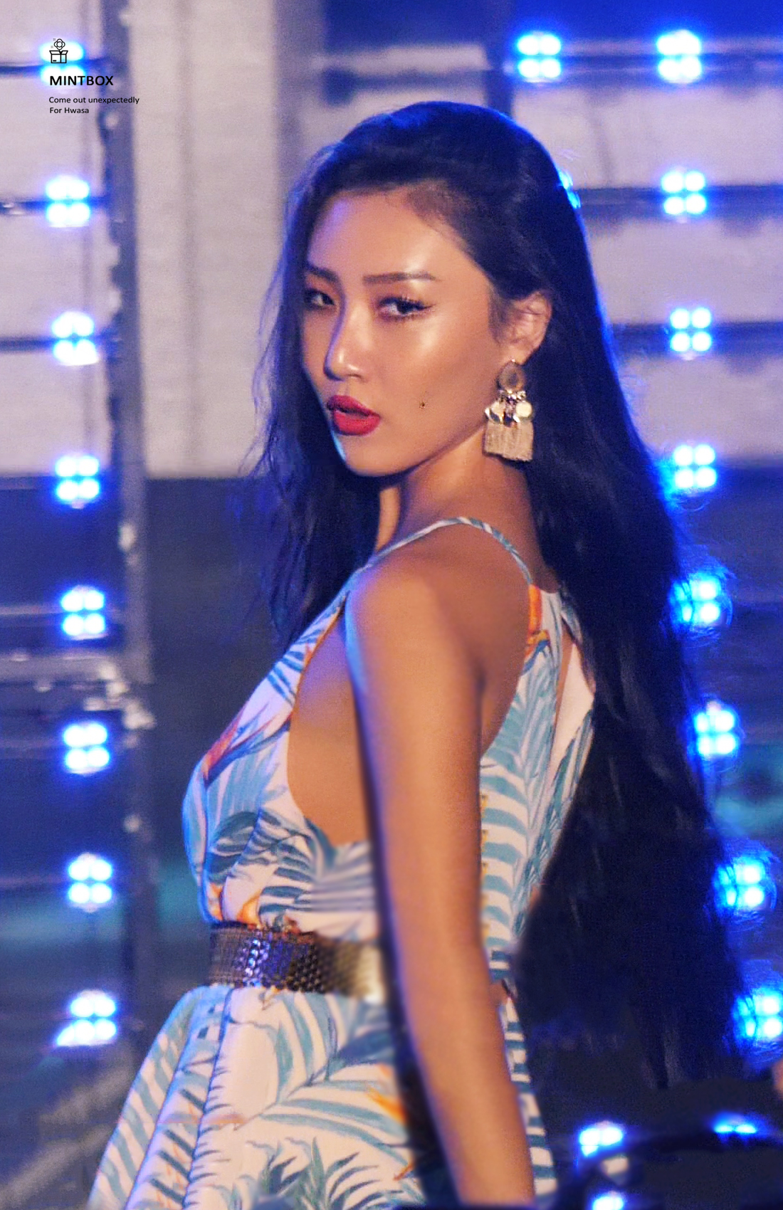 180918 한국외대 글로벌캠퍼스 축제에서 무대 중인 마마무 화사